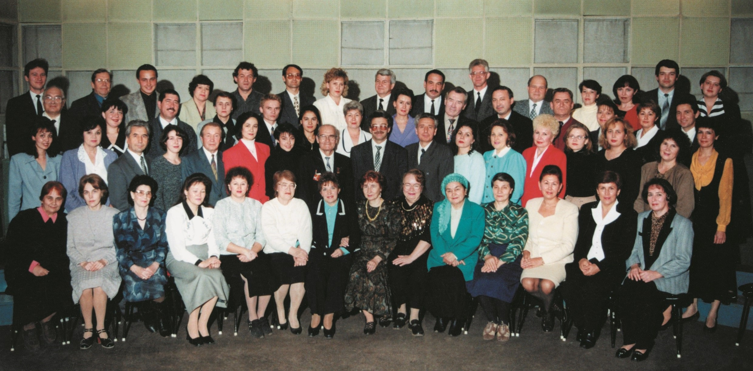 Татарча/tatarça: Татарстан радиосы коллективы 70 еллык юбилеен бәйрәм итә